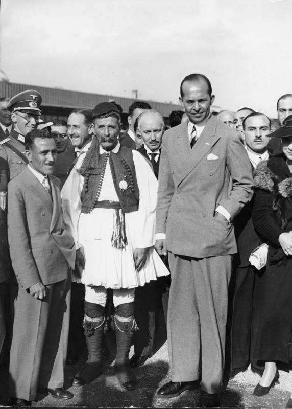 Berlin, Olympiade, Spyridon Louis, Kronprinz Paul Der griechische Thronfolger zum Olympiabesuch in Berlin eingetroffen. Auf dem Zentralflughafen der Reichshauptstadt, Tempelhof, landete am Donnerstagnachmittag der Thronfolger von Griechenland, Kronprinz Paul, um den Weltspielen beizuwohnen. Auf unserem Bild sieht man den Kronprinzen Paul zusammen mit dem ersten Olympia-Marathonsieger Spiridon Louis, der den Thronfolger auf dem Flughafen begrüßte. 30.7.1936 [Berlin, Olympische Sommerspiele.- Spyridon Louis mit griechischen Olypmia-Teilnehmern bei der Ankunft des griechischen Kronprinzen Paul von Griechenland am Flughafen Tempelhof] Abgebildete Personen: Louis, Spyridon: Leichtathlet, Marathonsieger 1896, Griechenland Paul I.: Königreich Griechenland, König, Griechenland